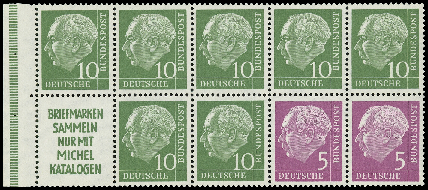 Information: Zweites Markenheftchen der BRD Ausgabepreis: Heftchenpreis: 250 Pfennig First Day of Issue / Erstausgabetag: 15. Januar 1955 Auflage: 500.000 Entwurf: Druckverfahren: Michel-Katalog-Nr: Ländercode-MiNr: H-Blatt 4